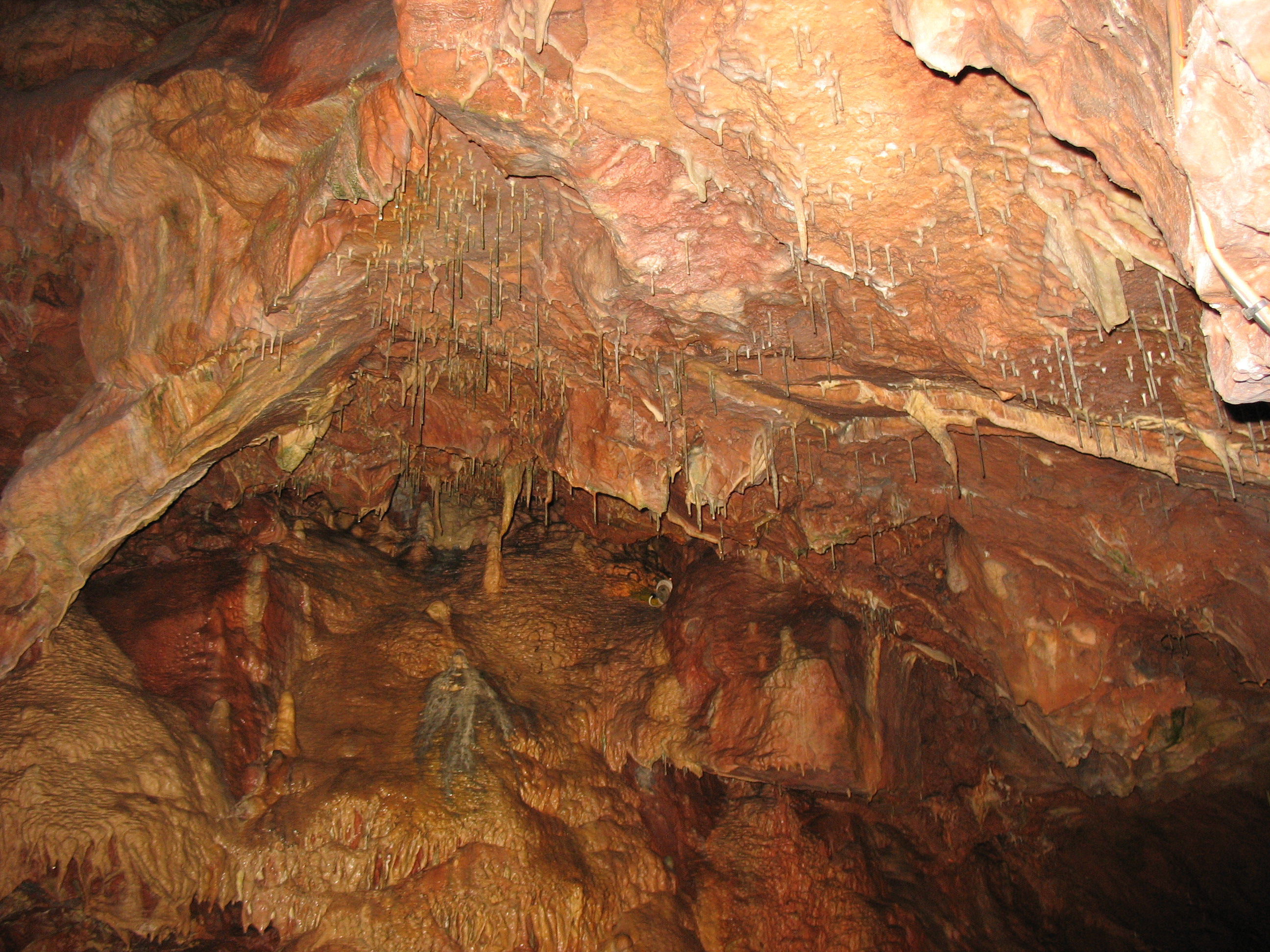 Informationen Beschreibung: Die Decke der Tropfsteinhöhle Kents Cavern in Torquay (England) Autor: Jcg2006 Aufnahmedatum: 11. April 2006 Quelle: selbst fotografiert